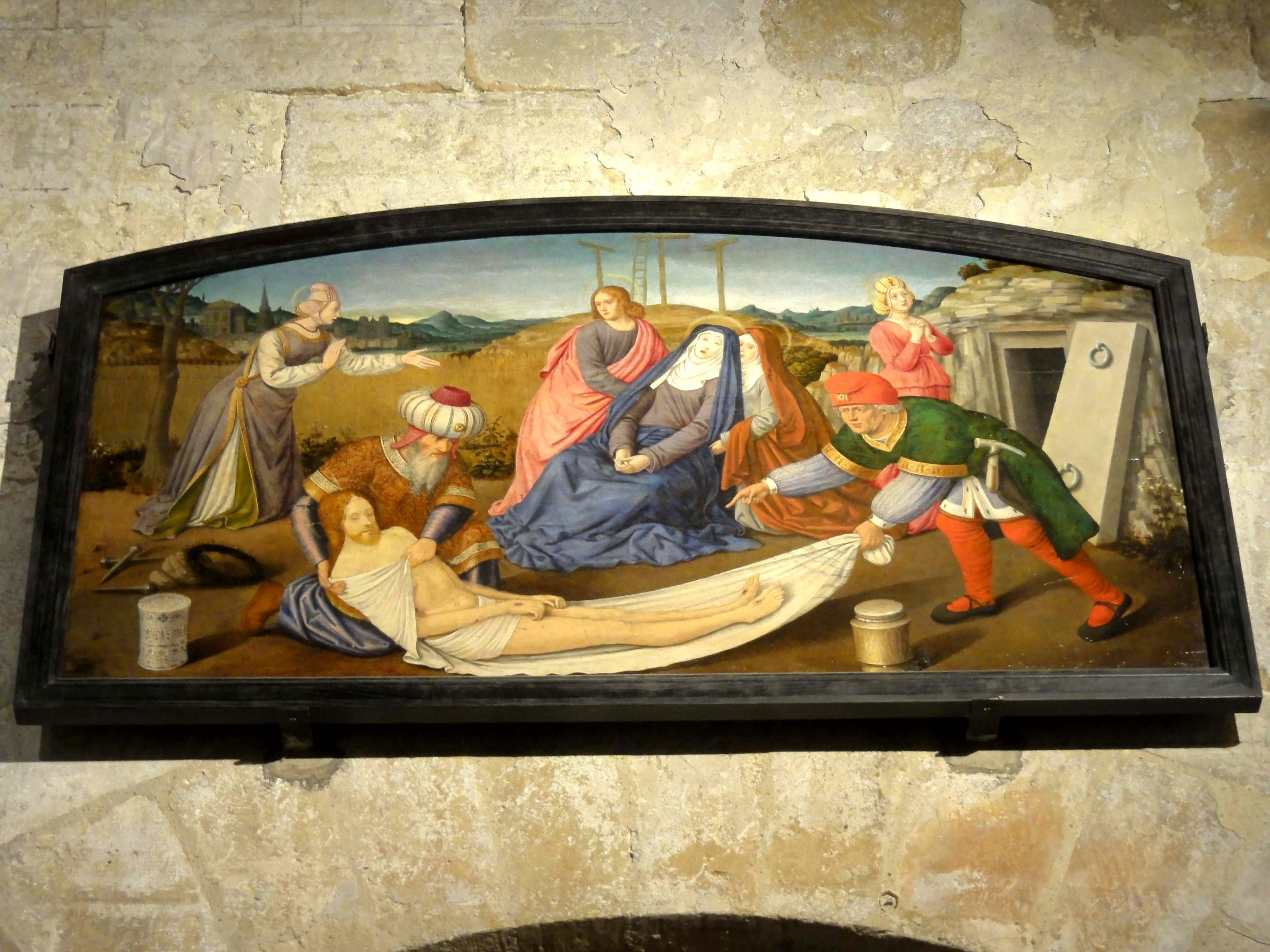 Mobilier de l'église - voir titre.